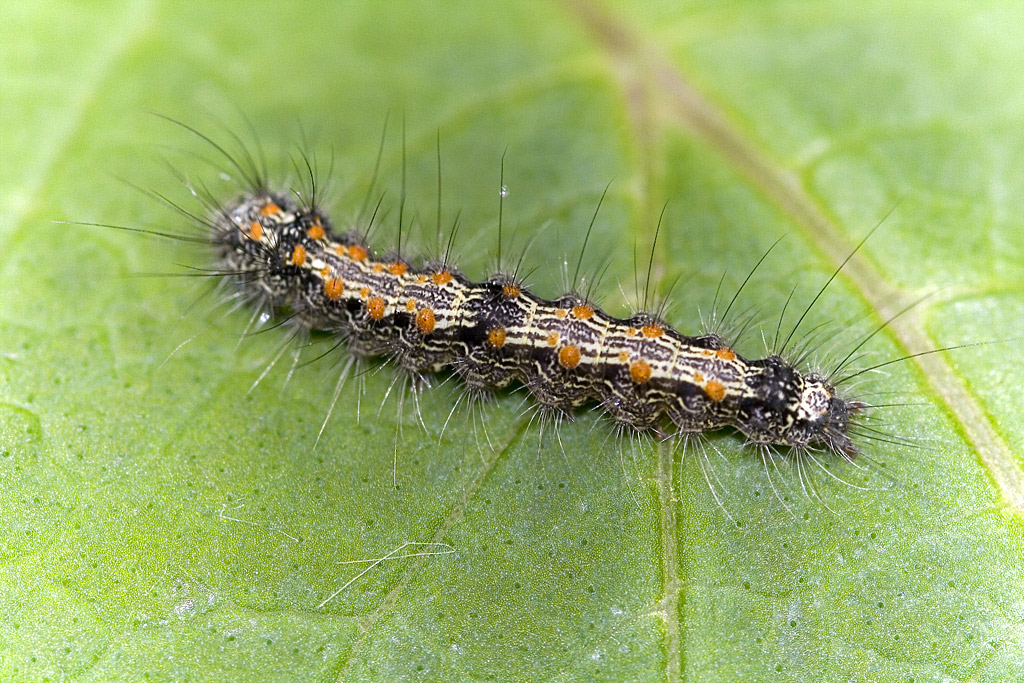 Lithosia quadra caterpillar